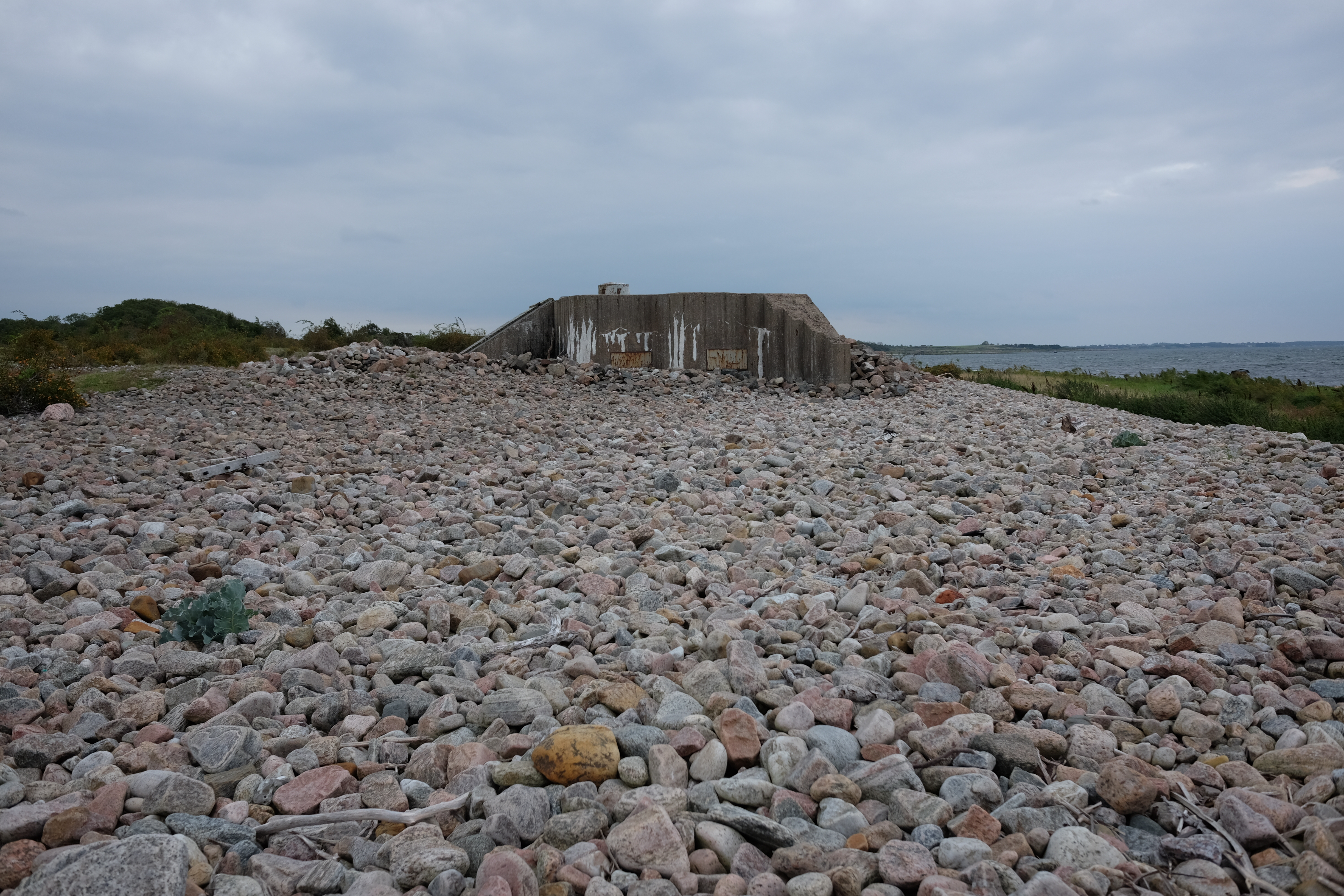 Gammal försvarsanläggning, Rammsjöstrand.